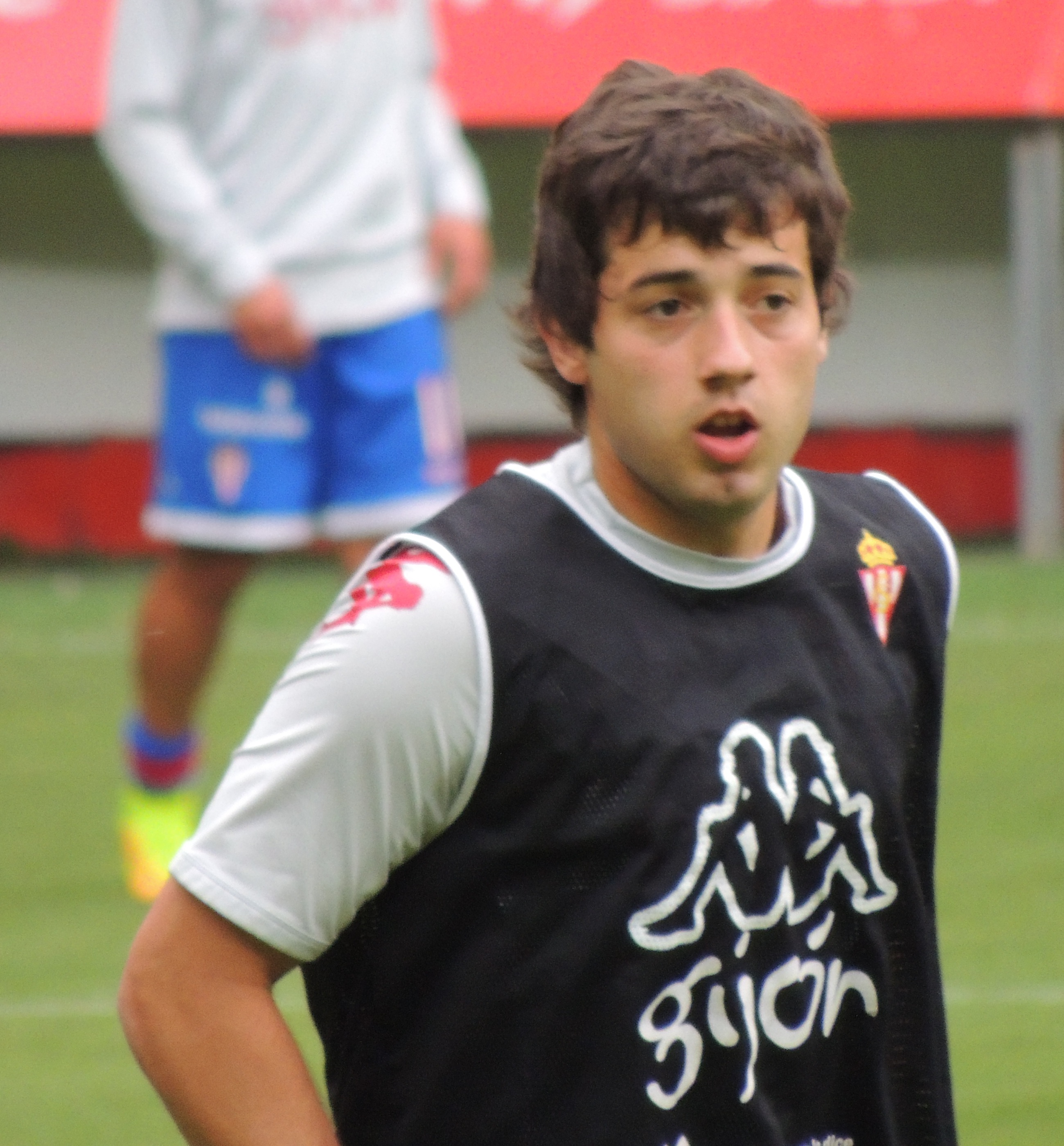 Calentamiento previo a partido contra UD Las Palmas en El Molinón.